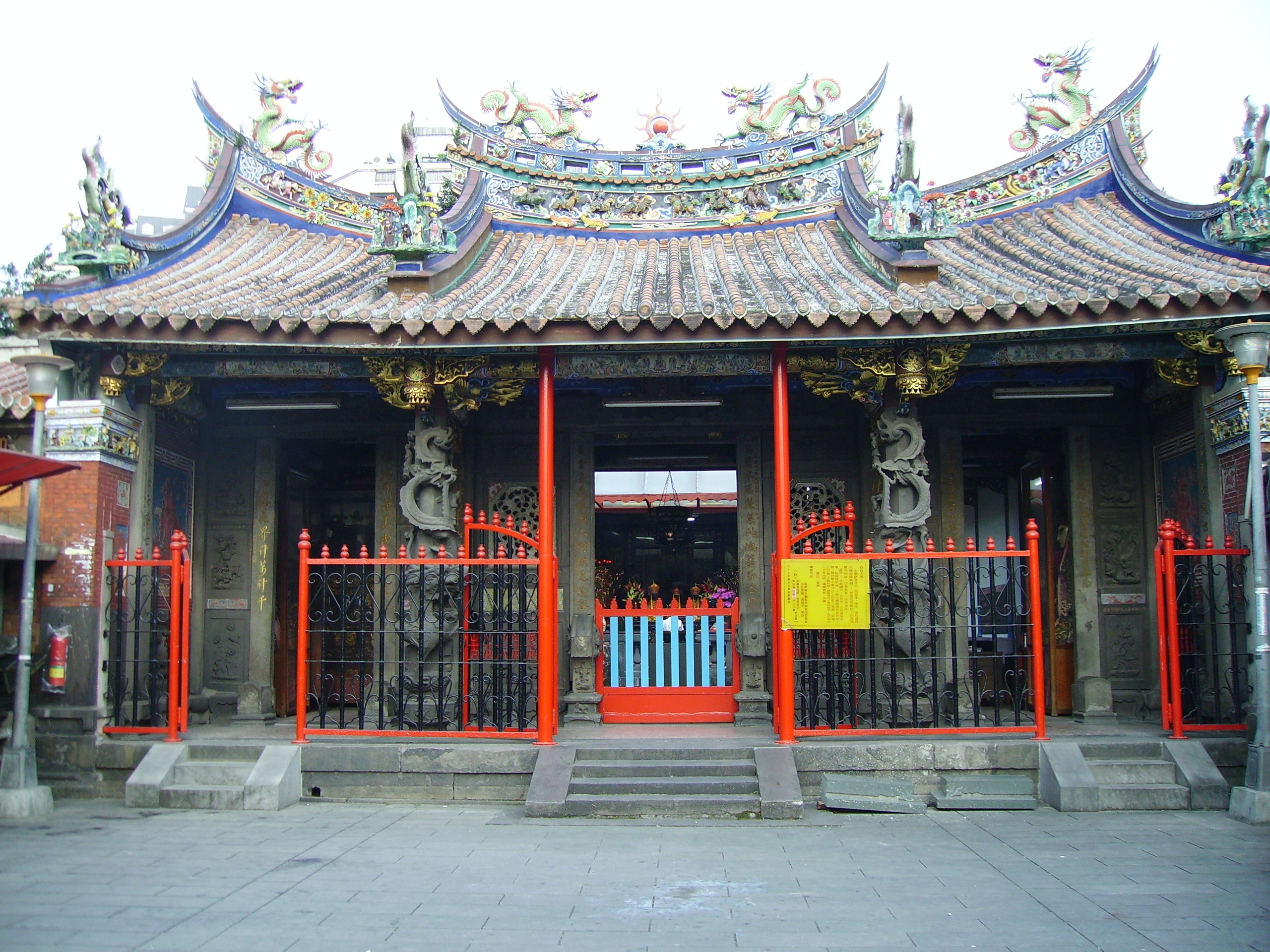 臺北市萬華區清水巖祖師廟。